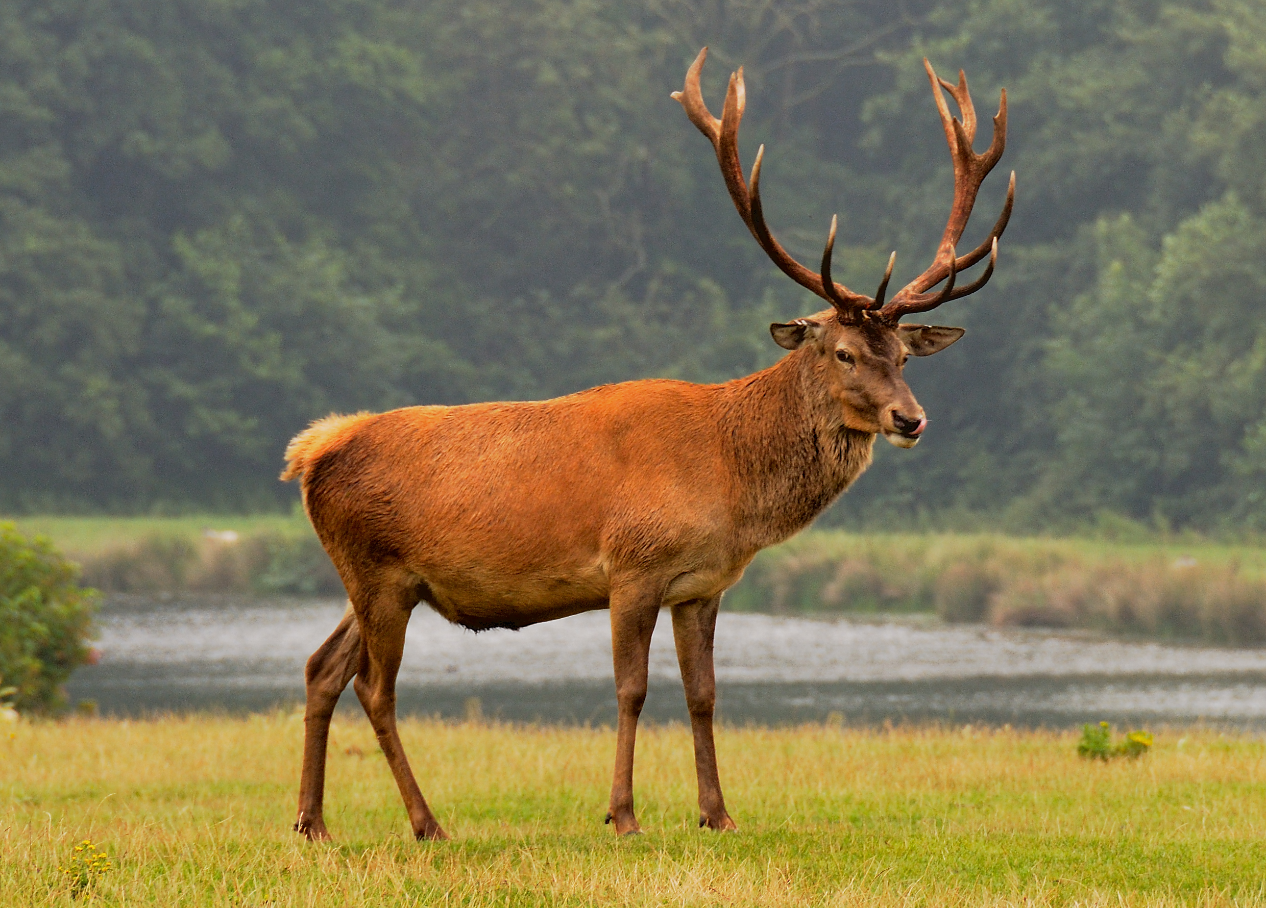 Red Deer